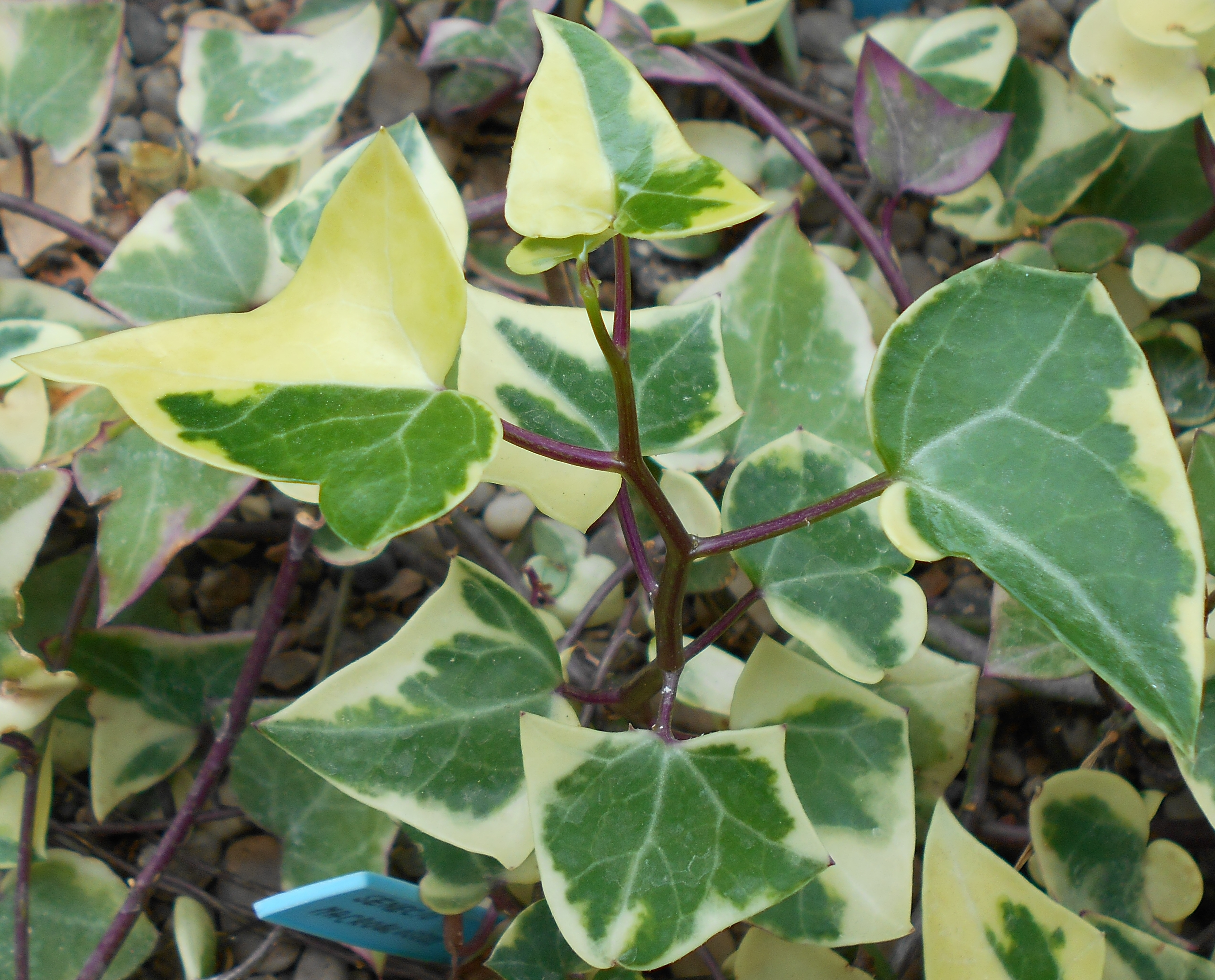 Starzec bluszczolistny (Senecio macroglossus), Ogród Botaniczny UMCS w Lublinie